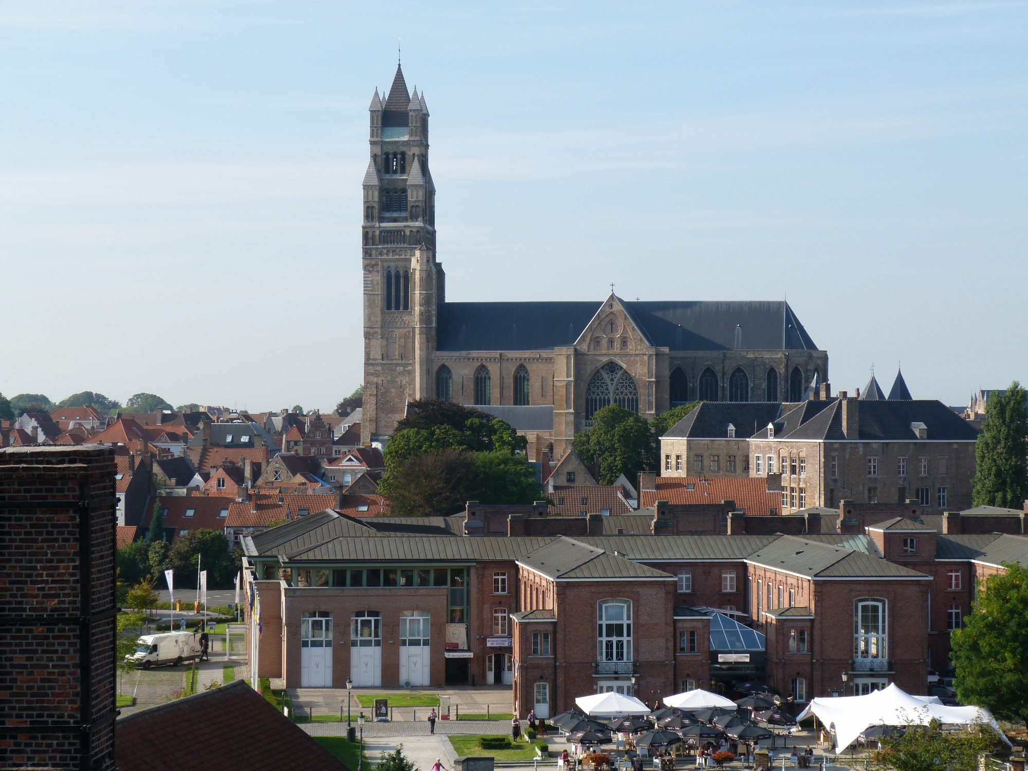 Zicht vanop brouwerij De Halve Maan op Brugge, met o.a. de Sint-Salvatorskathedraal en de site van het Oud-Sint-Jan.